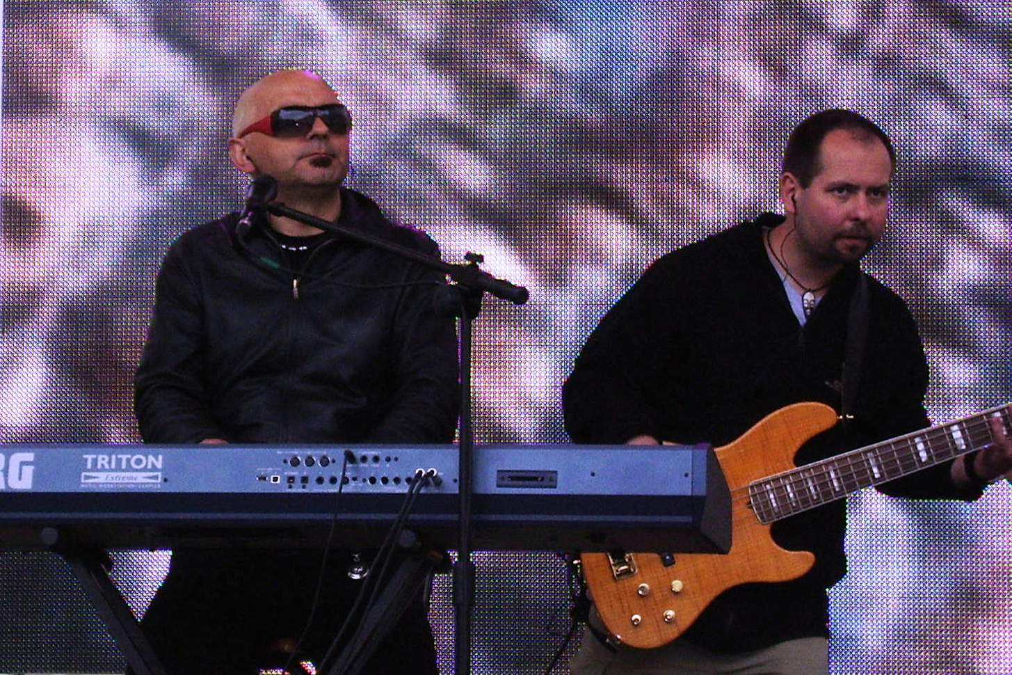 Lombard w Rzeszowie 19-06-2010: Grzegorz Stróżniak i Michał Kwapisz.